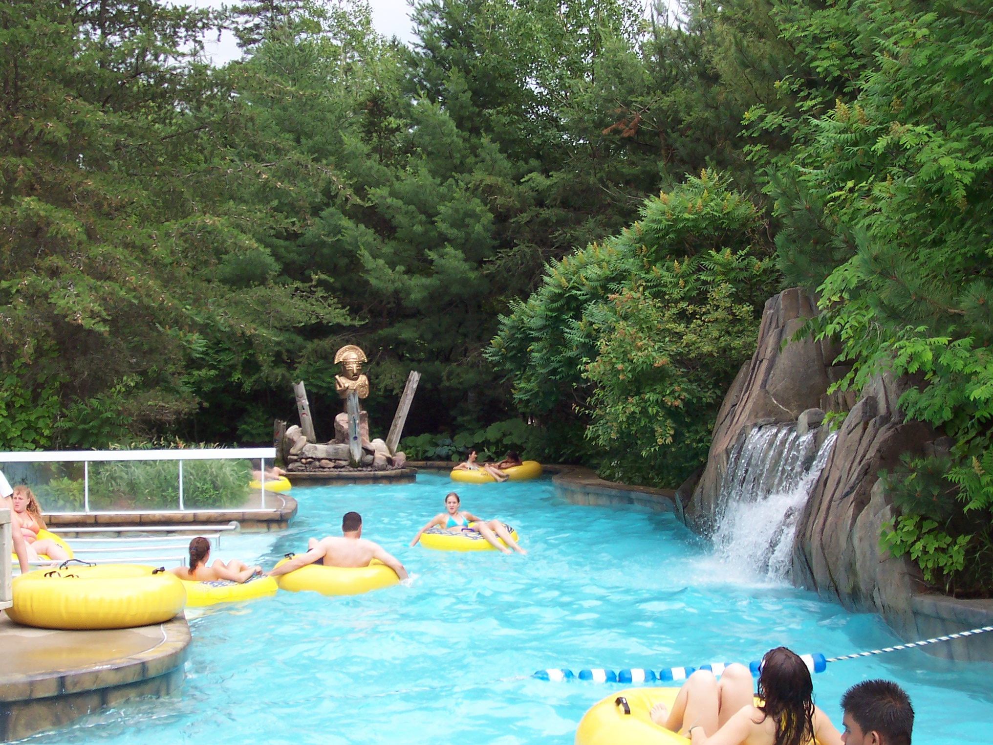 Village Vacances Valcartier, Quebec, Canada - Départ de la rivière d'aventure L'Amazone / Start of the Amazone adventure river